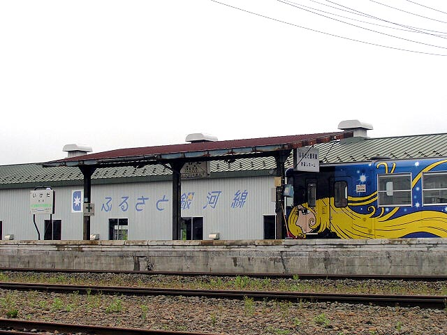 ふるさと銀河線発着ホーム。 撮影場所 池田駅駅前公道。 撮影者によるGFDLリリース